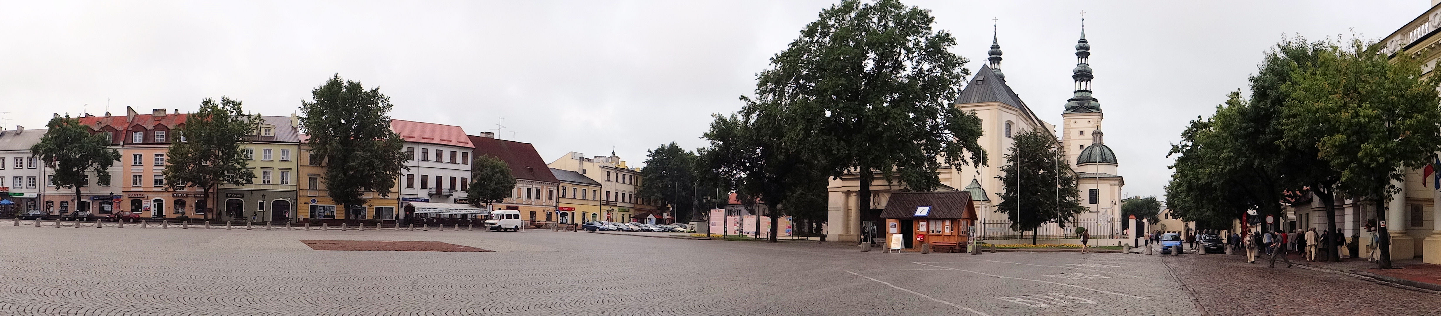 Panorama Starego Rynku w Łowiczu z widokiem wielu zabytków